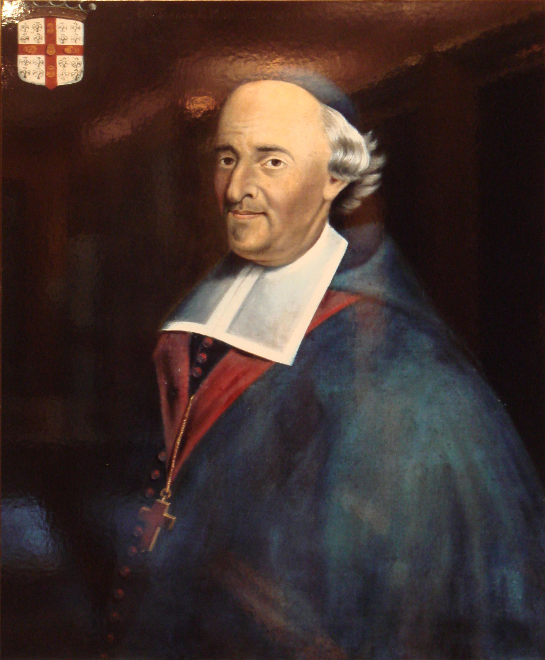 Francois de Laval